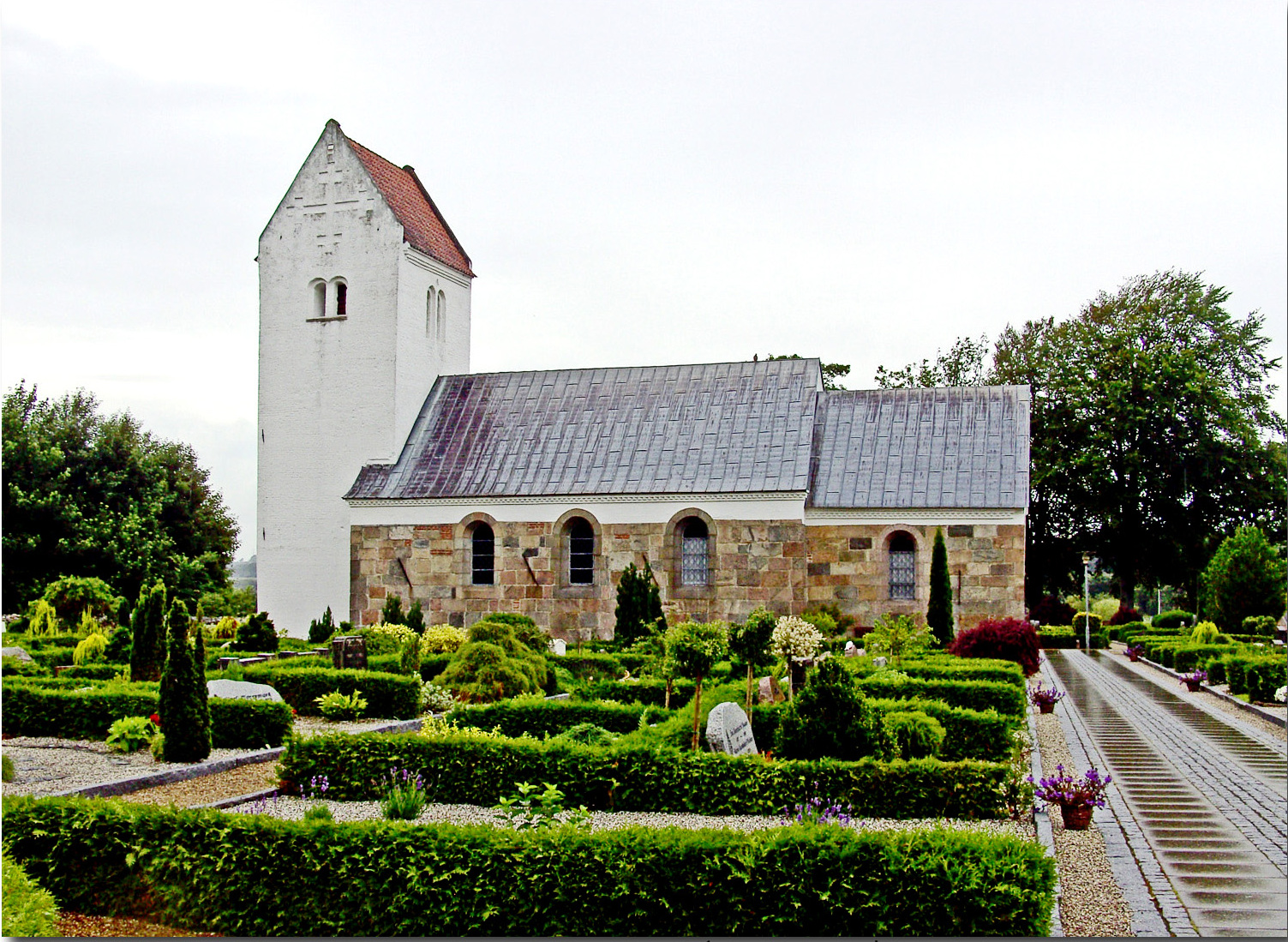 fra syd